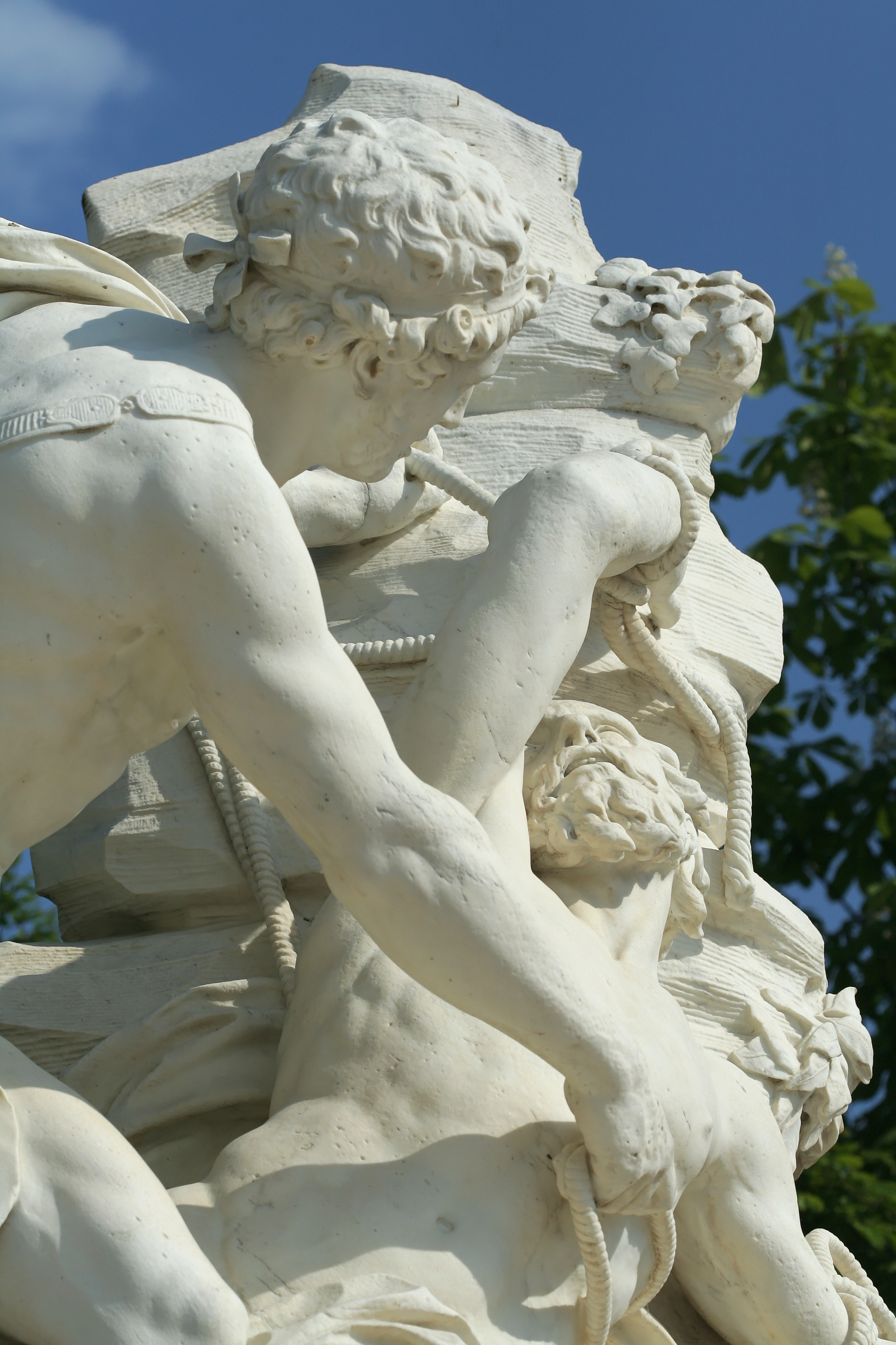 Aristée attachant le dieu marin Protée à un rocher pour le forcer à lui dévoiler son avenir.